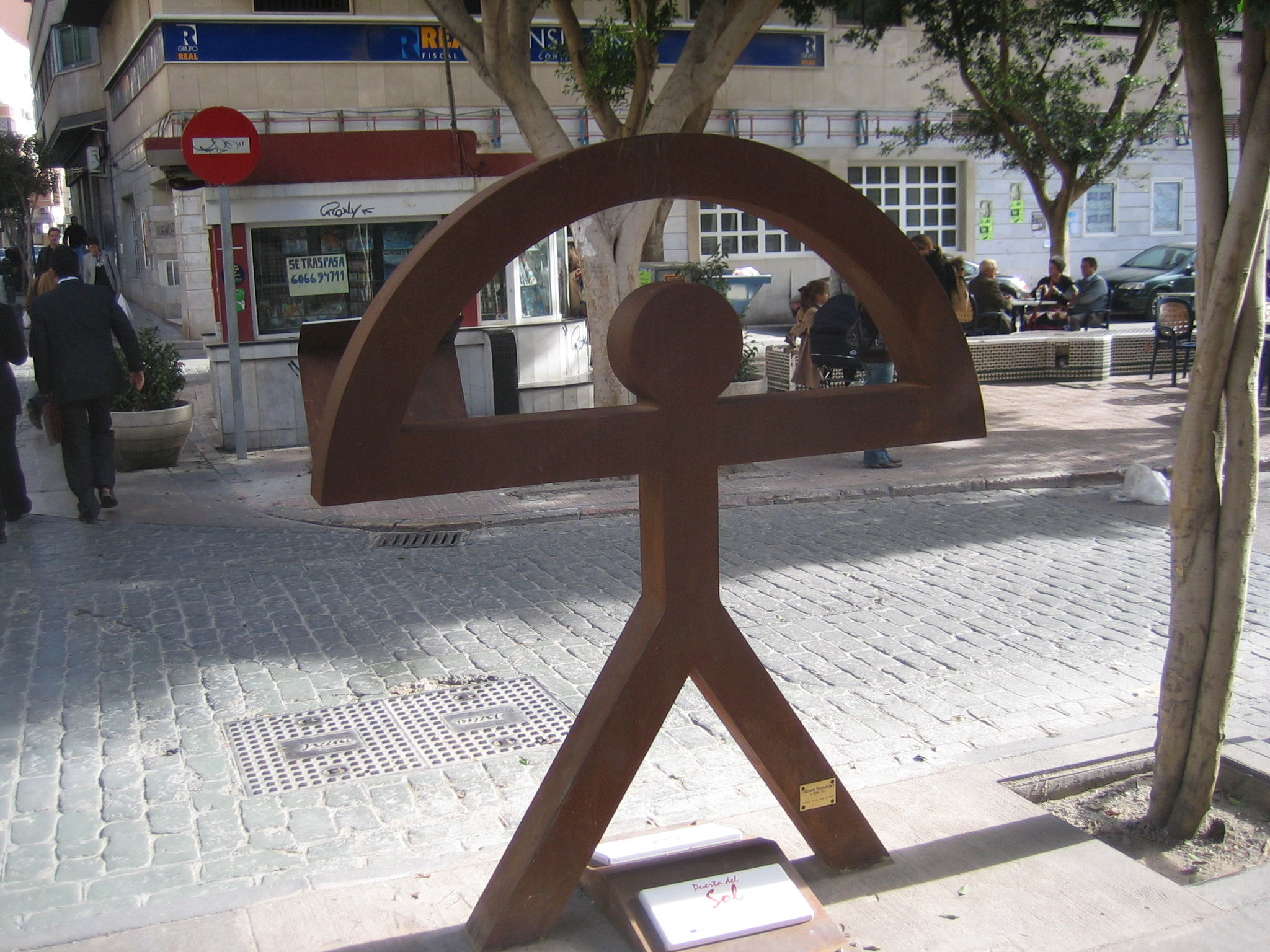 Escultura en metal del indalo realizada en la «Plaza de los Burros» en Almería. Elemento del mobiliario urbano municipal forma parte de un proyecto de señalización de las puertas de las antiguas murallas de la ciudad.